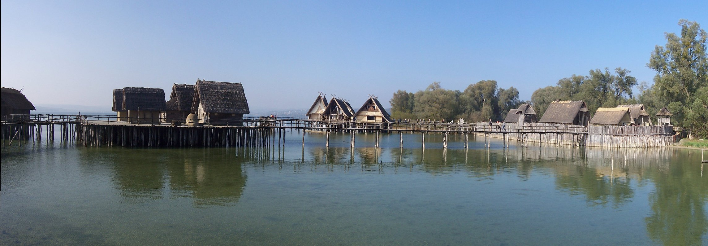 Pfahlbau Museum Unteruhldingen , Pfahlbaumuseum Unteruhldingen